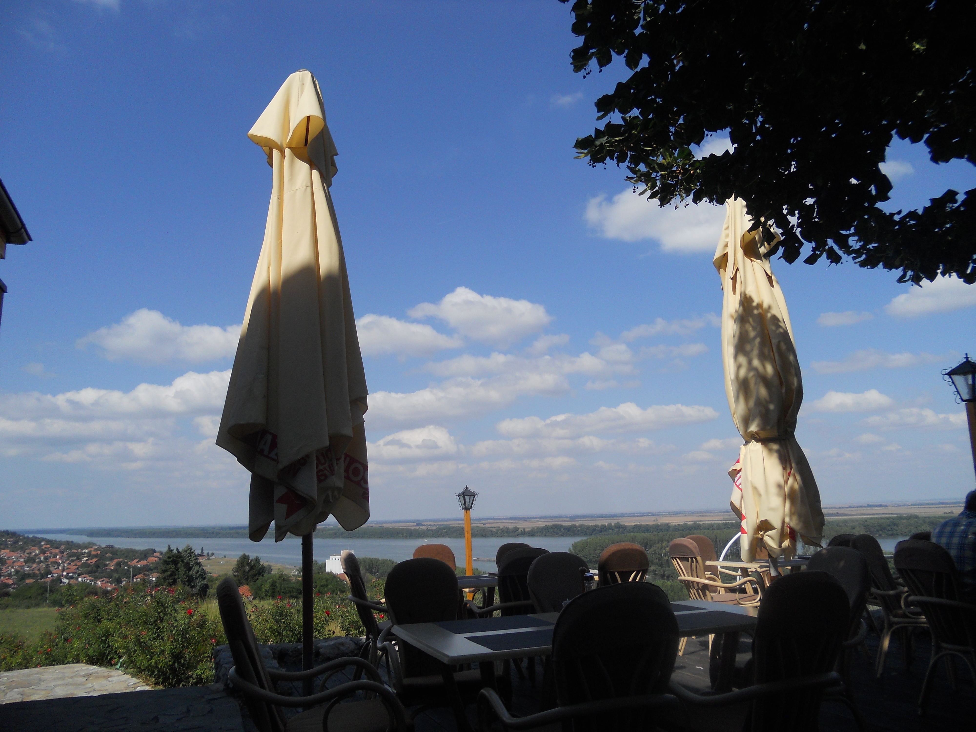 Restoran Vinogradi Grocka